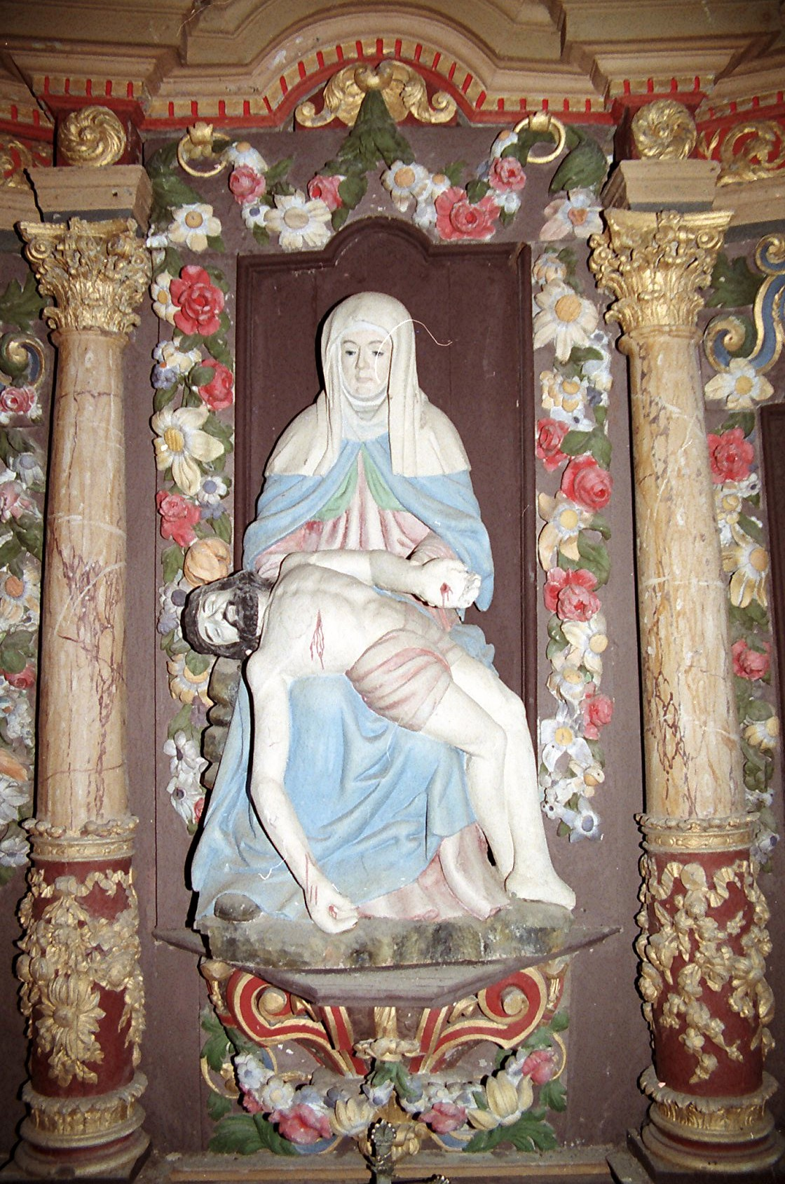 Église Cloitre Pleyben, denez goasguen.